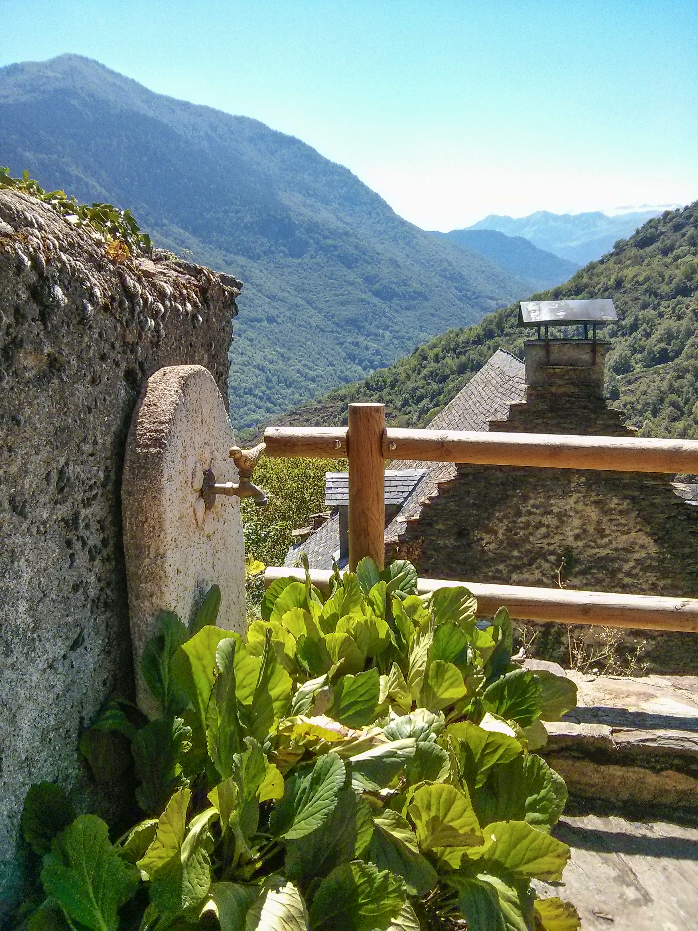 Vistas del Valle de Arán desde Bausen